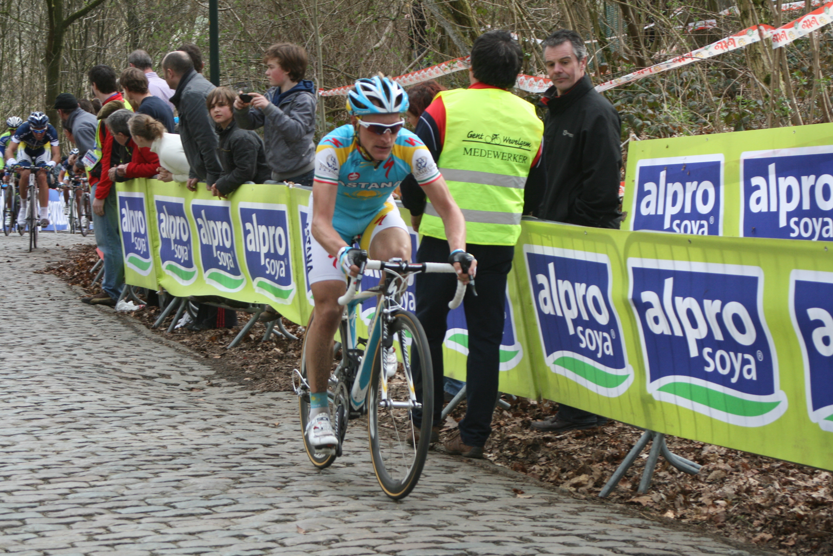 Enrico Gasparotto dans la deuxième ascension du mont Kemmel lors de Gand-Wevelgem 2010